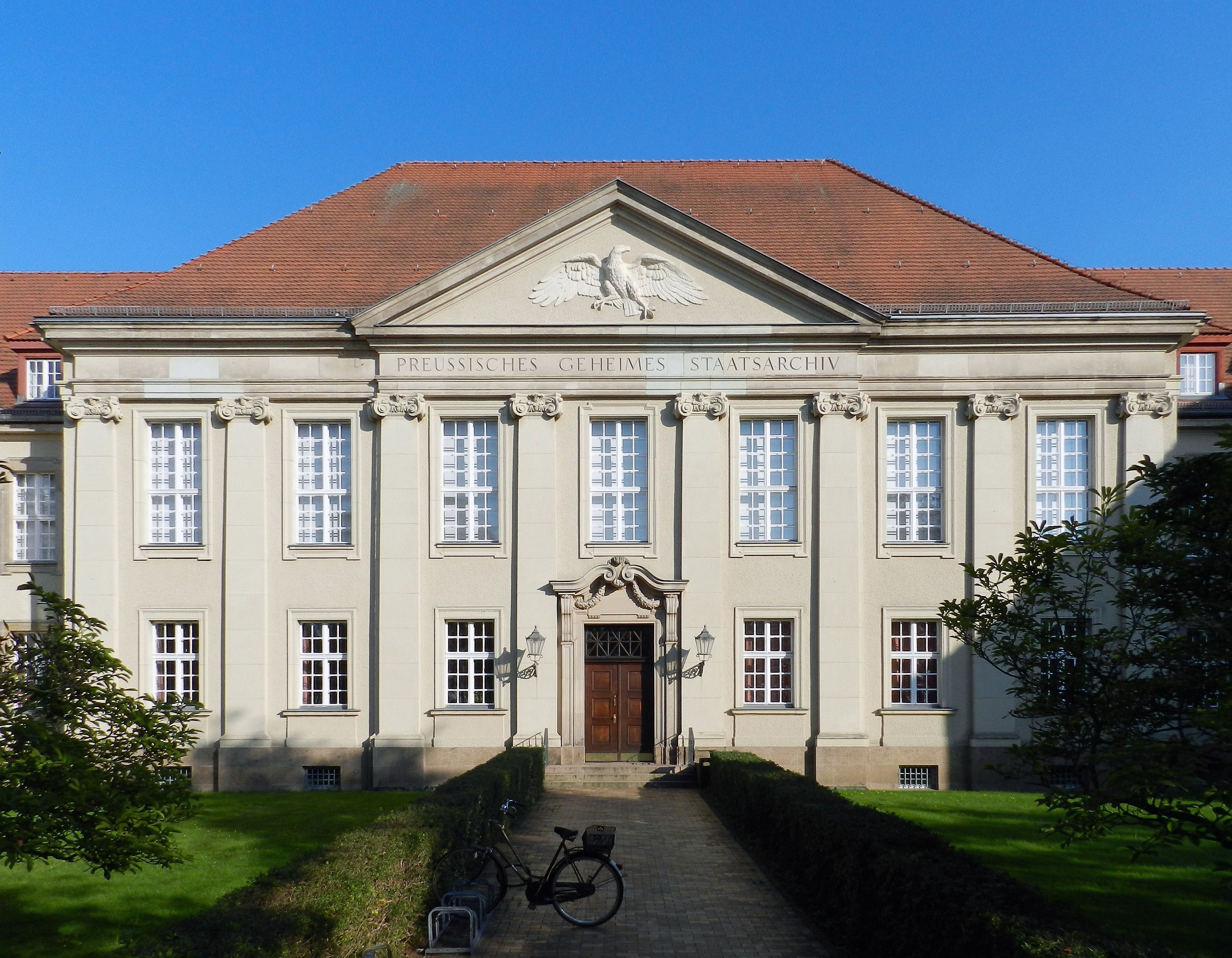 Archivgebäude Archivstr. 12-14, Berlin-Dahlem. Bauzeit: 1915-23, Entwurf: Eduard Fürstenau.